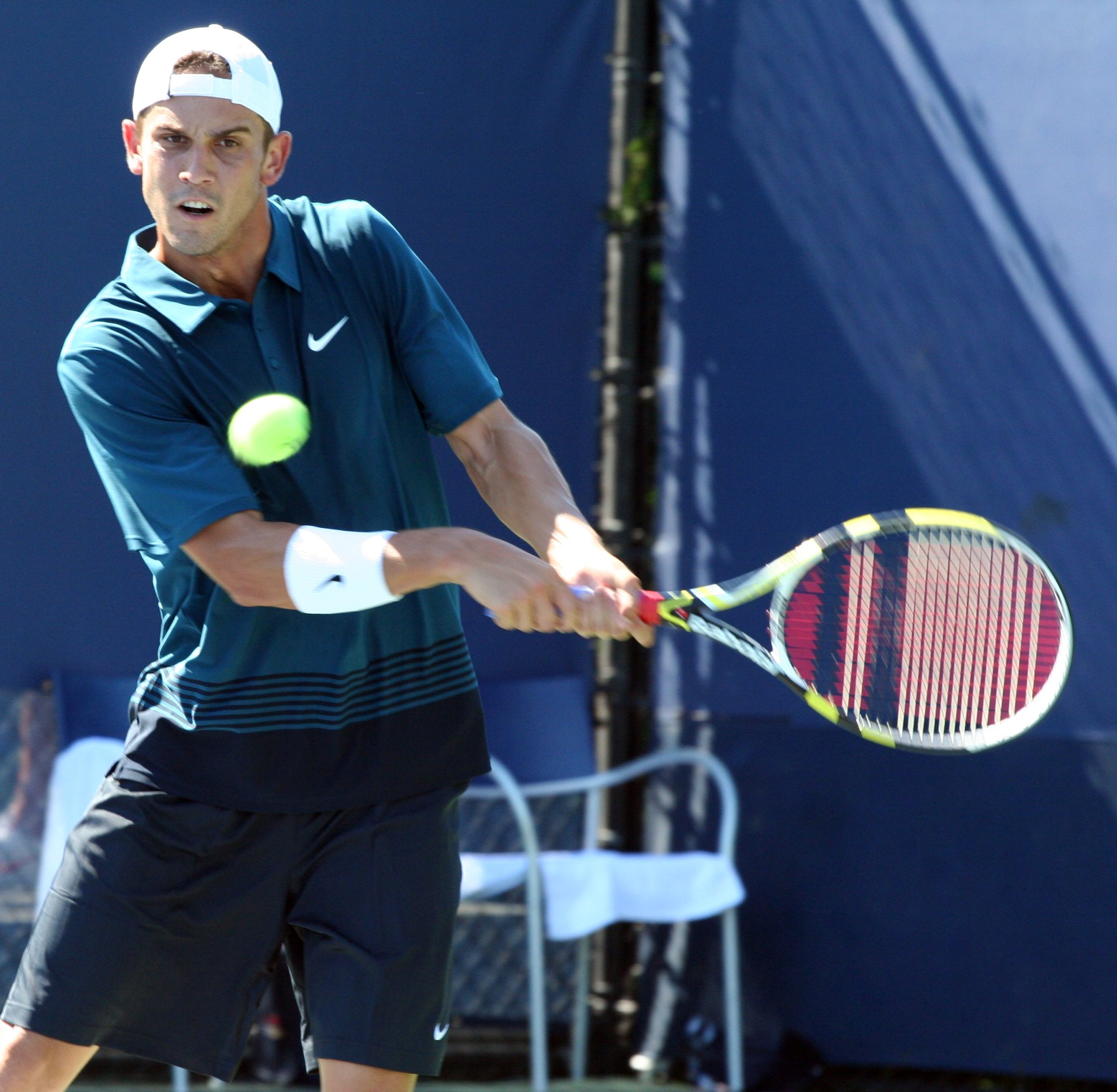 U.S. Open Aug. 30, 2010